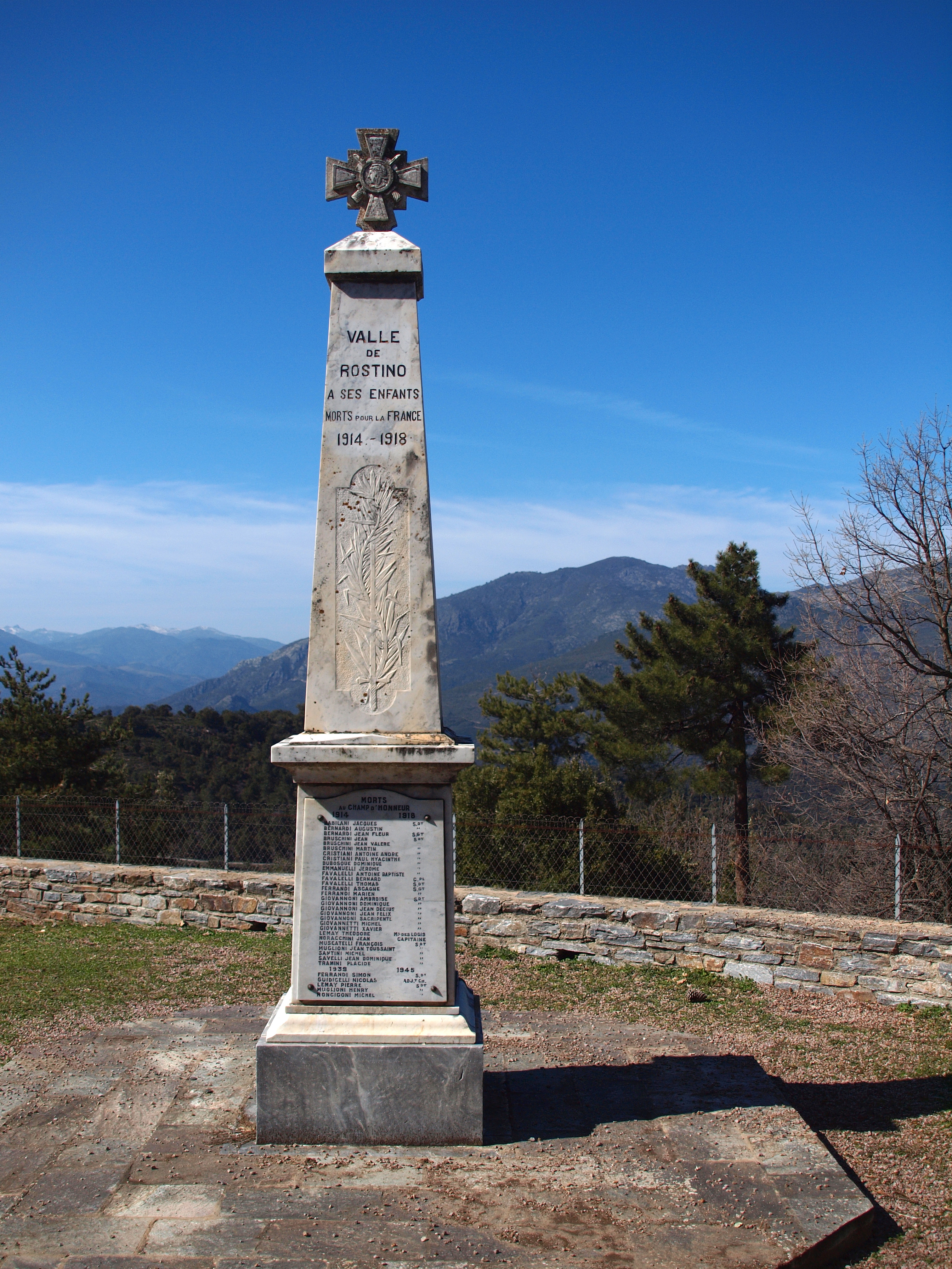 Valle-di-Rostino, Rustinu (Corse) - Monument aux morts devant l'élise paroissiale Saint-Michel Corsu: E Valle di Rustinu, Rustinu (Corsica) - Munumentu di i morti dinanzu a chjesa paruchjale San Michele